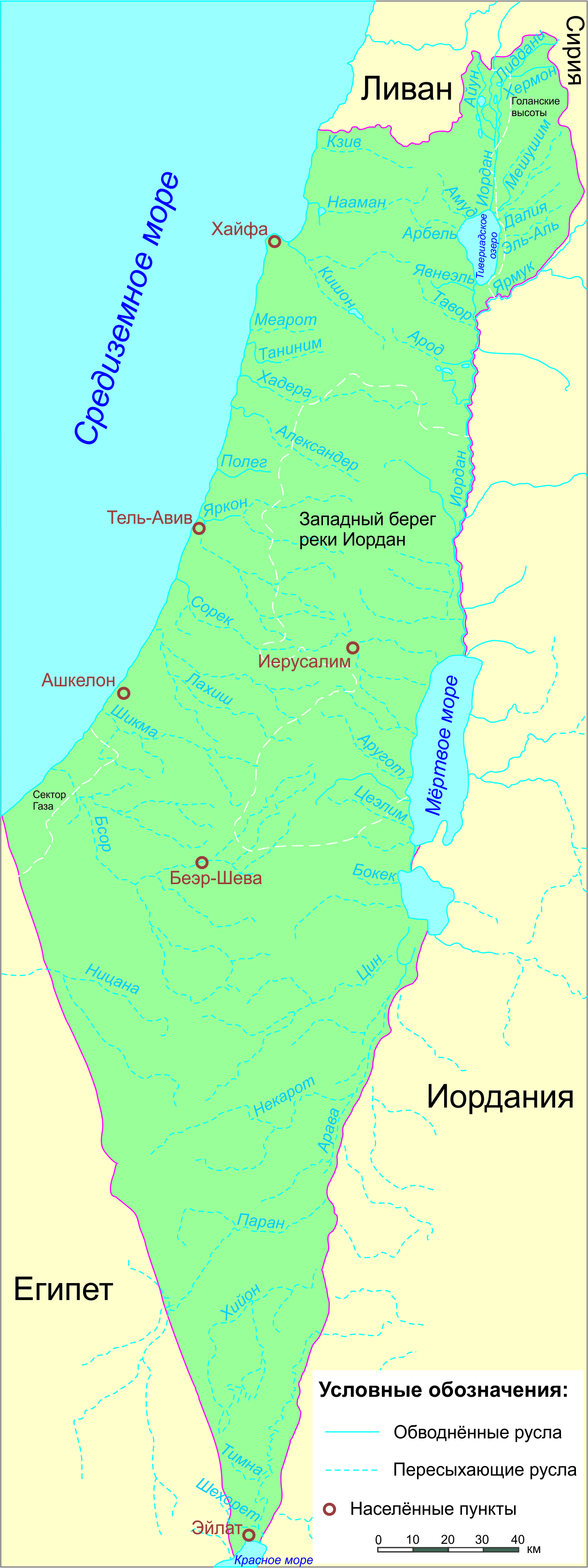 Гидрография Израиля. Карта рек Израиля.